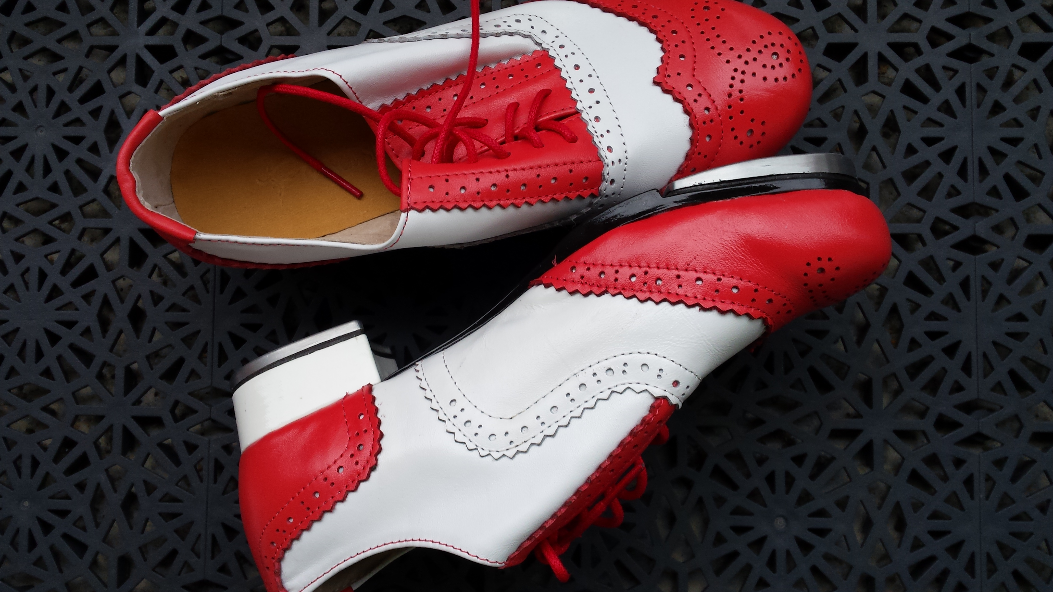 Steppesko